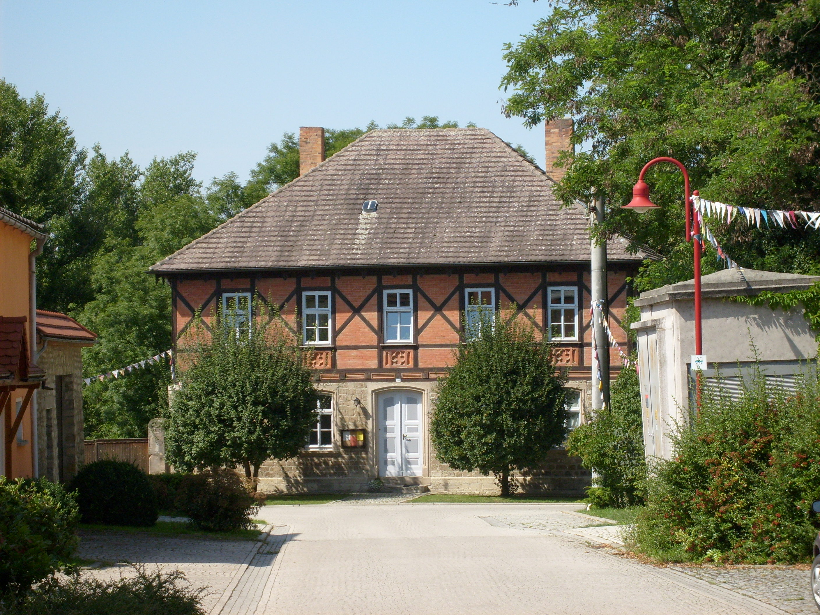 Pfarrhaus Mattstedt 2007